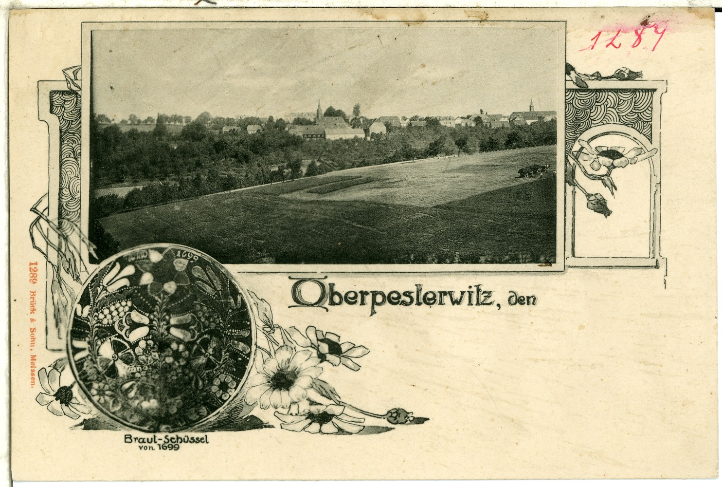 Oberpesterwitz; Gesamtansicht, Braut-Schüssel von 1699 This postcard is from publisher Brück & Sohn in Meißen ( postcard has a unique number 01289 and is available in a higher resolution at the publisher. This images was uploaded in a cooperation project between Wikipedians and the publisher.